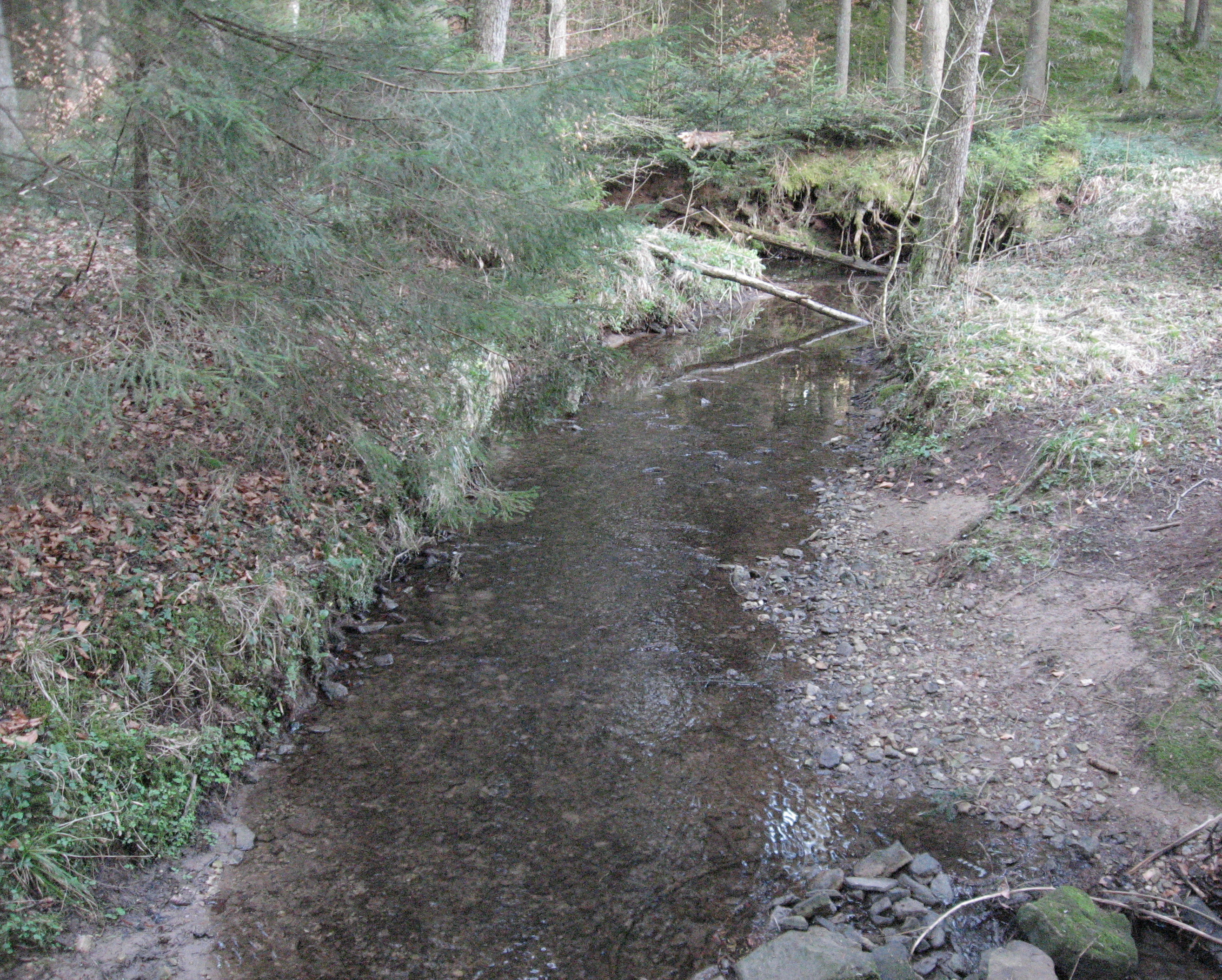 Blick auf den Grundbach in seinem Waldtal wenig oberhalb des Klingenbach-Zulaufs. Aufnahme talaufwärts in Richtung NE vom Holzsteg des Kirchenwegs von Schönbronn nach Bühlerzell über den Bach. Im Bachbett liegt Keupersandsteingeröll.